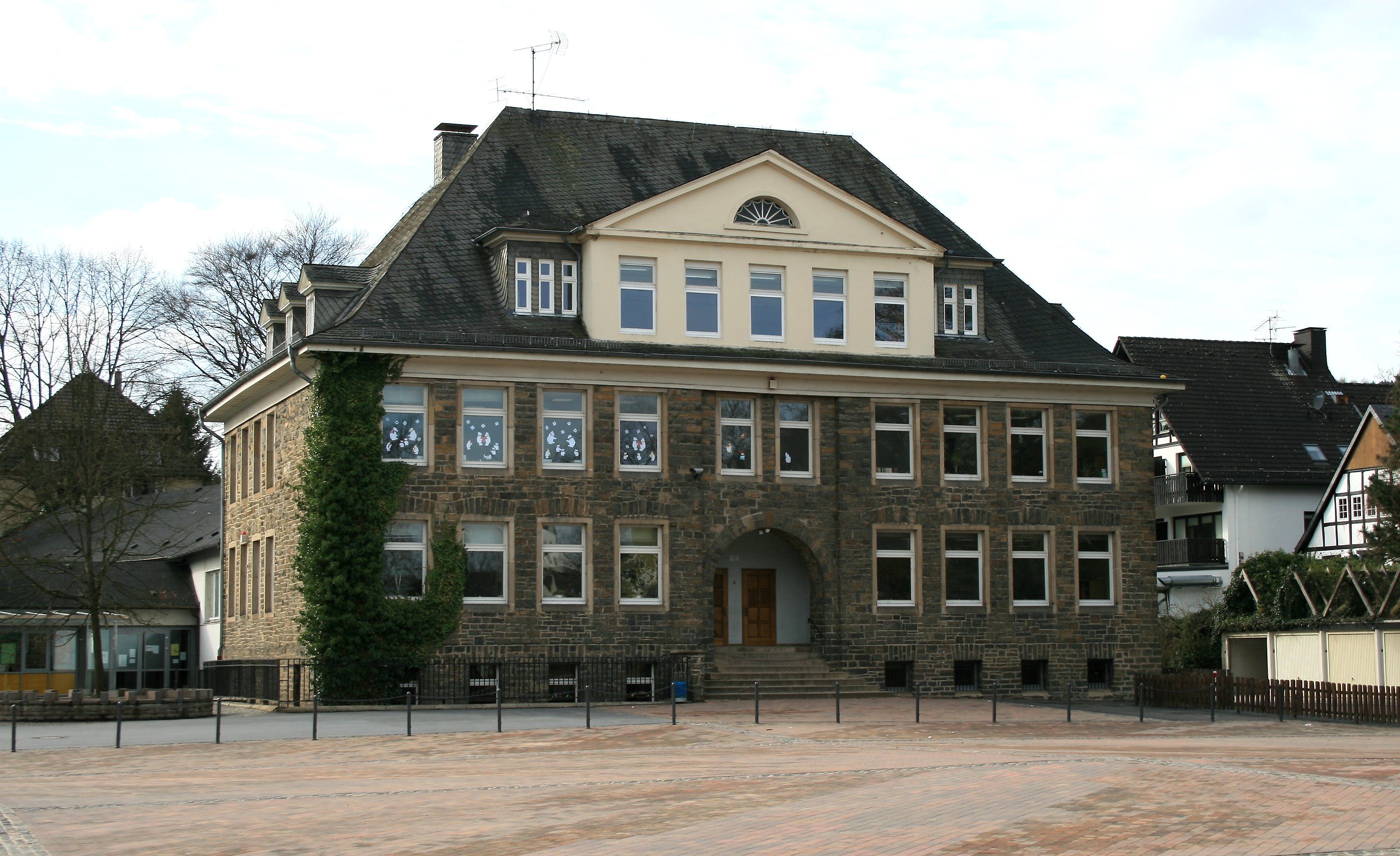 Städtische Gemeinschaftsgrundschule „Burgschule“ (Baujahr 1912) in Neuenrade.